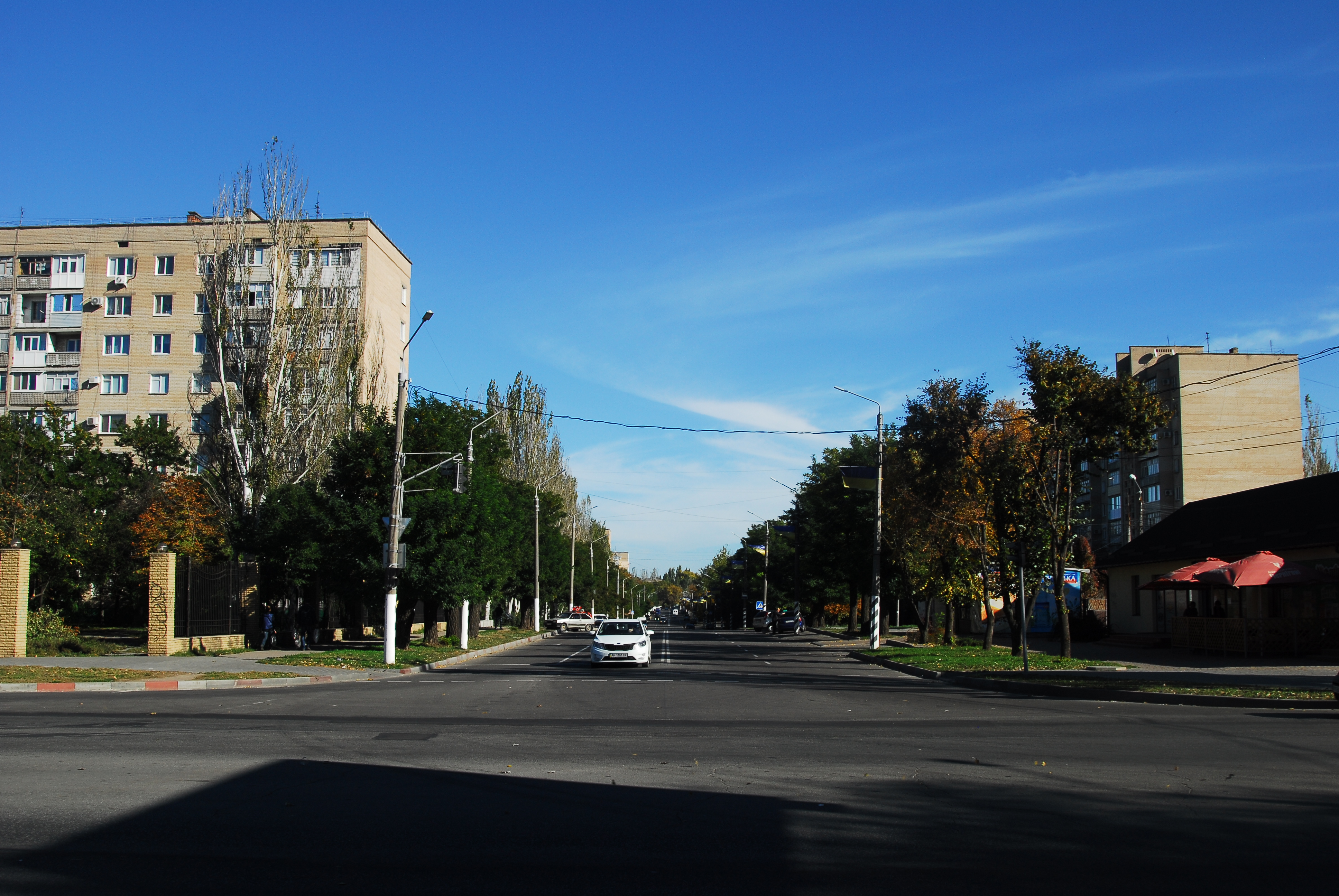 Мелитополь